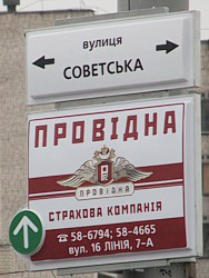 Sign in the Radianska Str. in Luhansk.